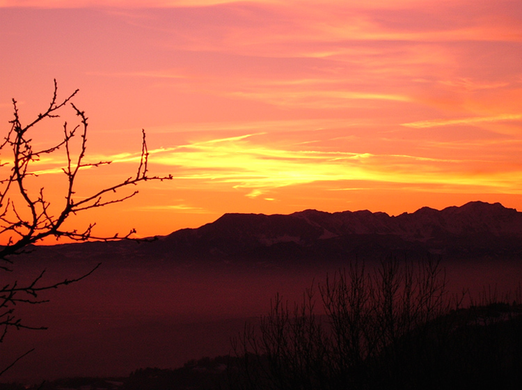 Le Piccole Dolomiti vicentine viste al tramonto dall'Altopiano dei Sette Comuni